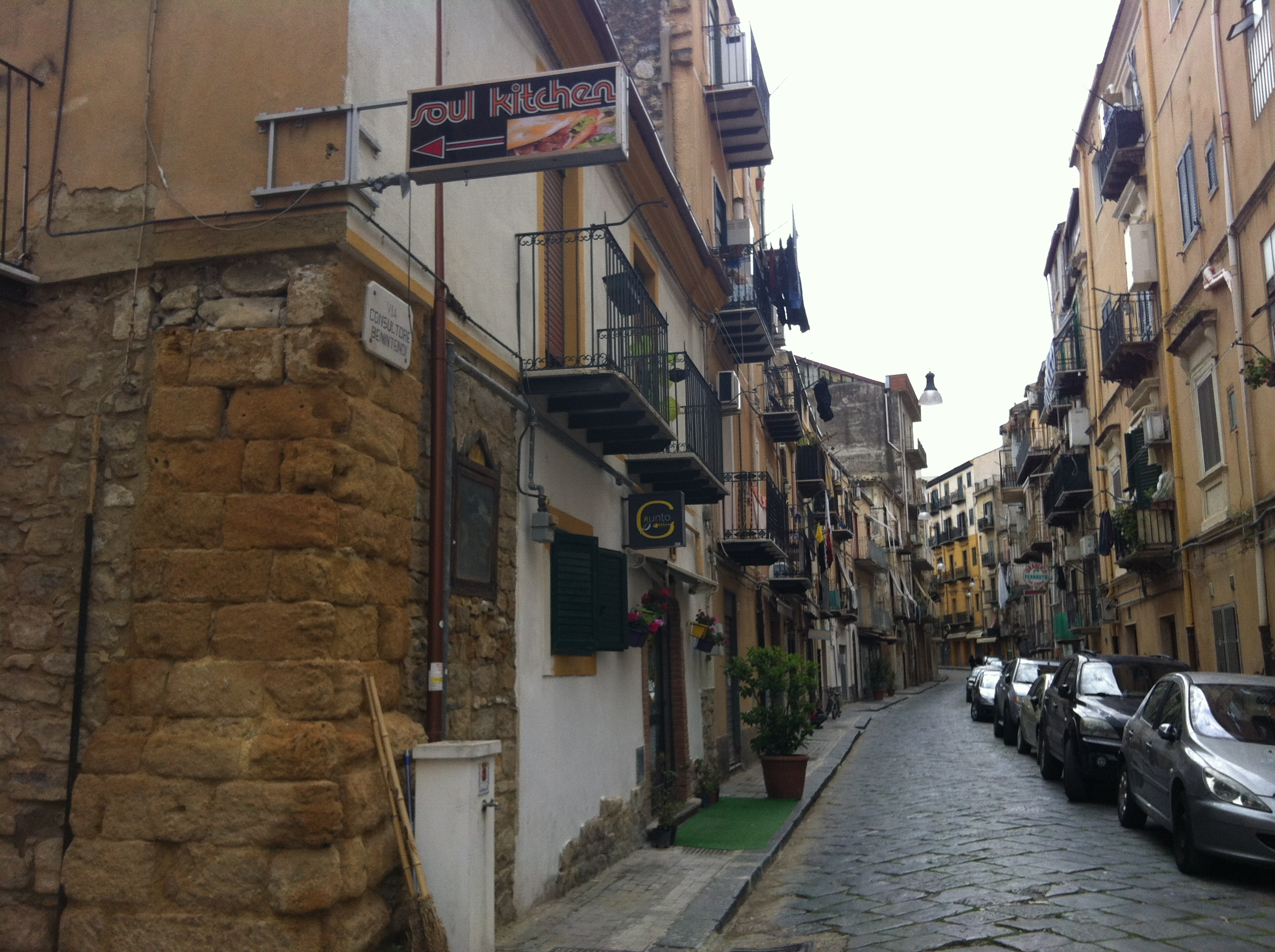 Caltanissetta - Centro storico: Strada a foglia (via Consultore Benintendi)